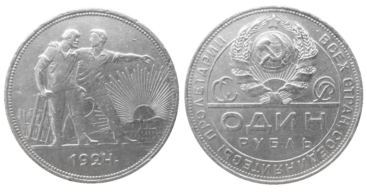 рубль СССР 1924, серебро 900-й пробы.